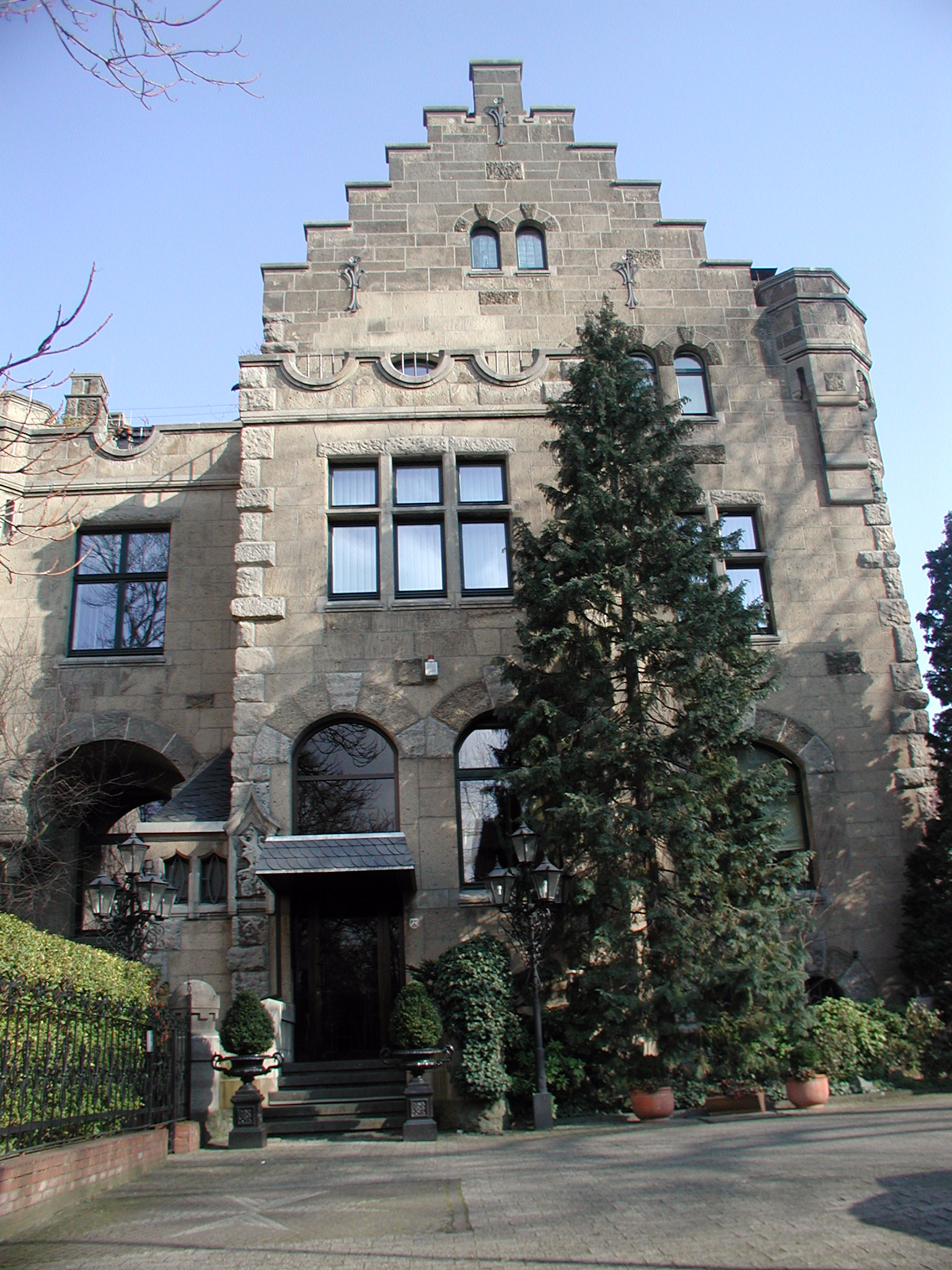 Jugendstilvilla 1904 Rodenkirchen